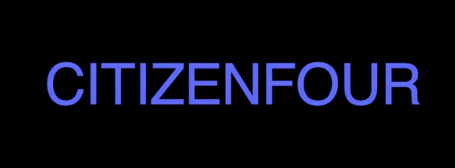 Screenshot da me catturato dal trailer del film Citizenfour